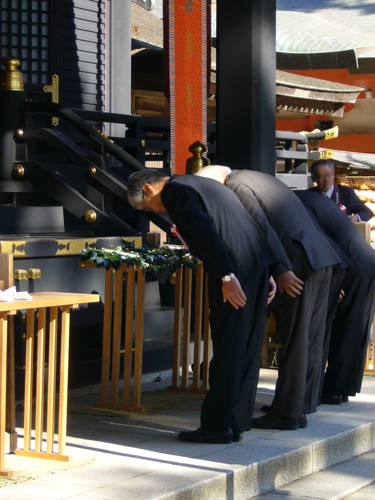 Bow,hai-rei,katori-jingu-shrine,katori-city,japan